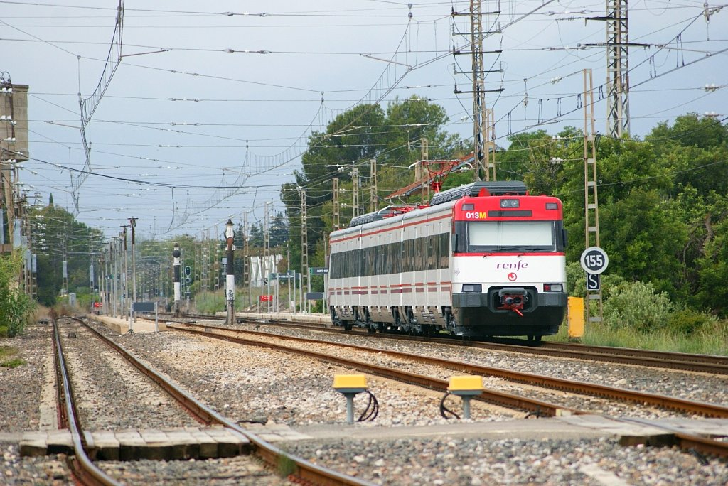 Serie 447 de Renfe en la estación de Montroig.